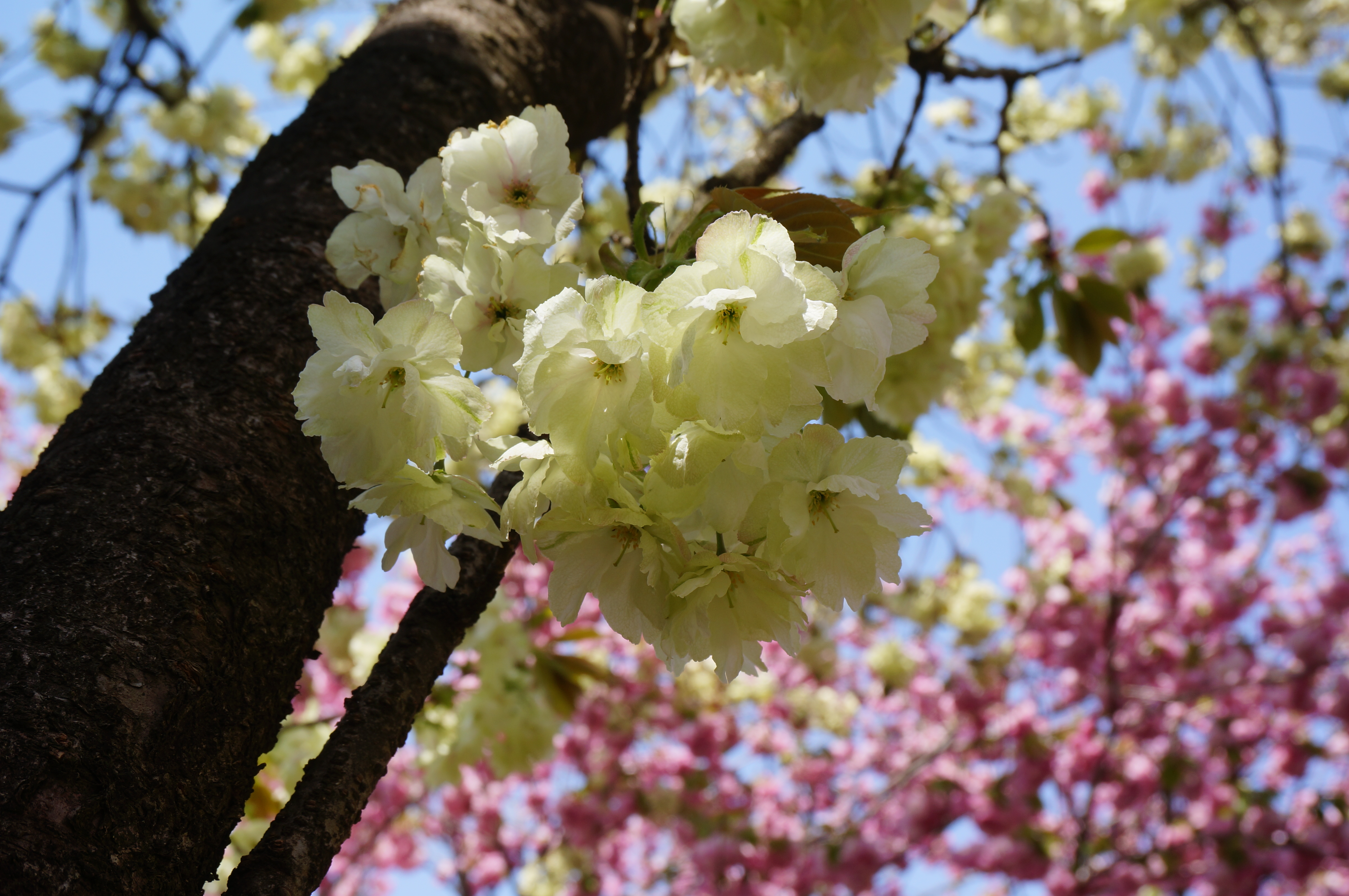 日本花の会結城農場さくら見本園にて